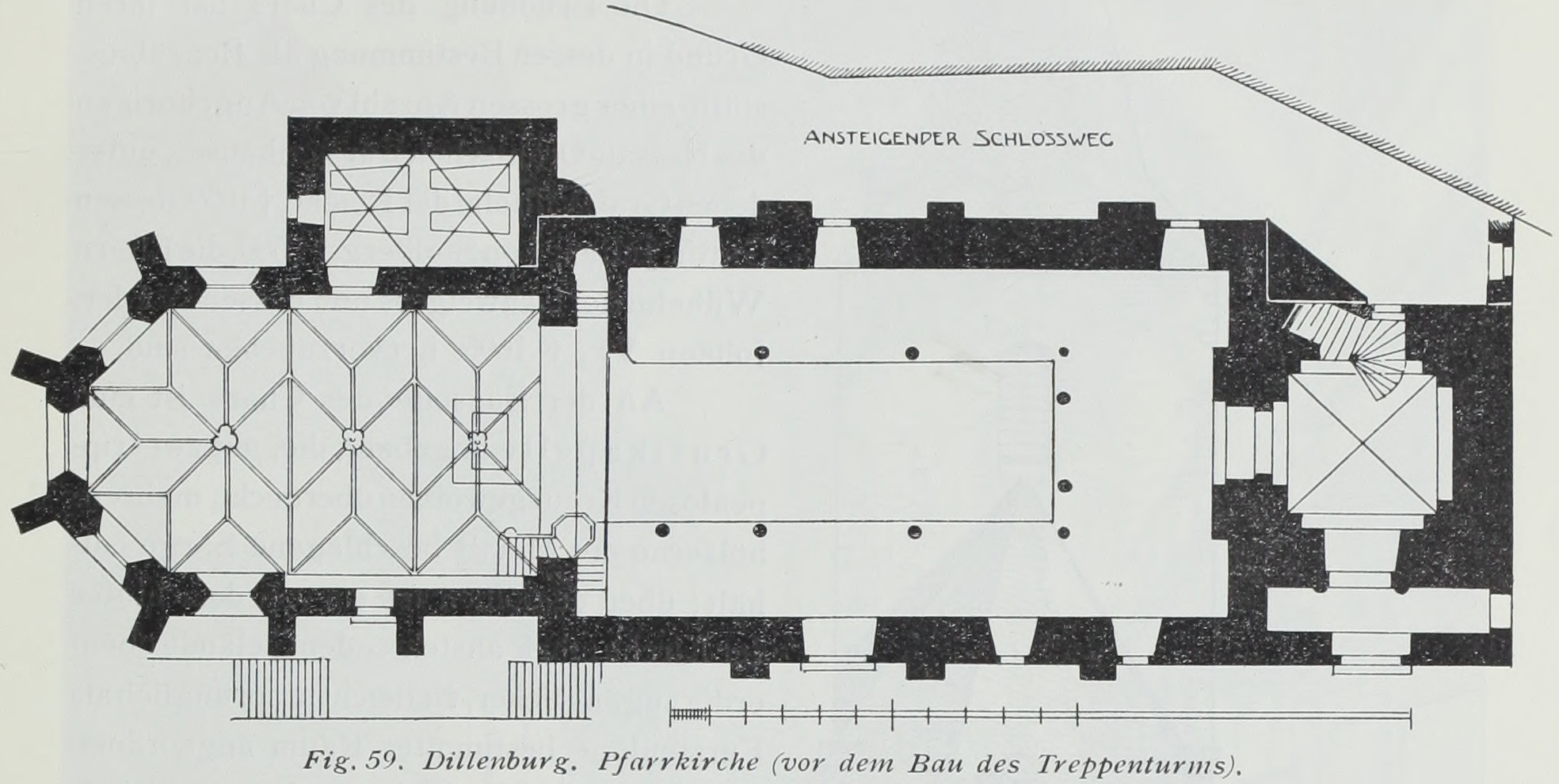 Dillenburg Pfarrkirche (vor dem Bau des Treppenturms)